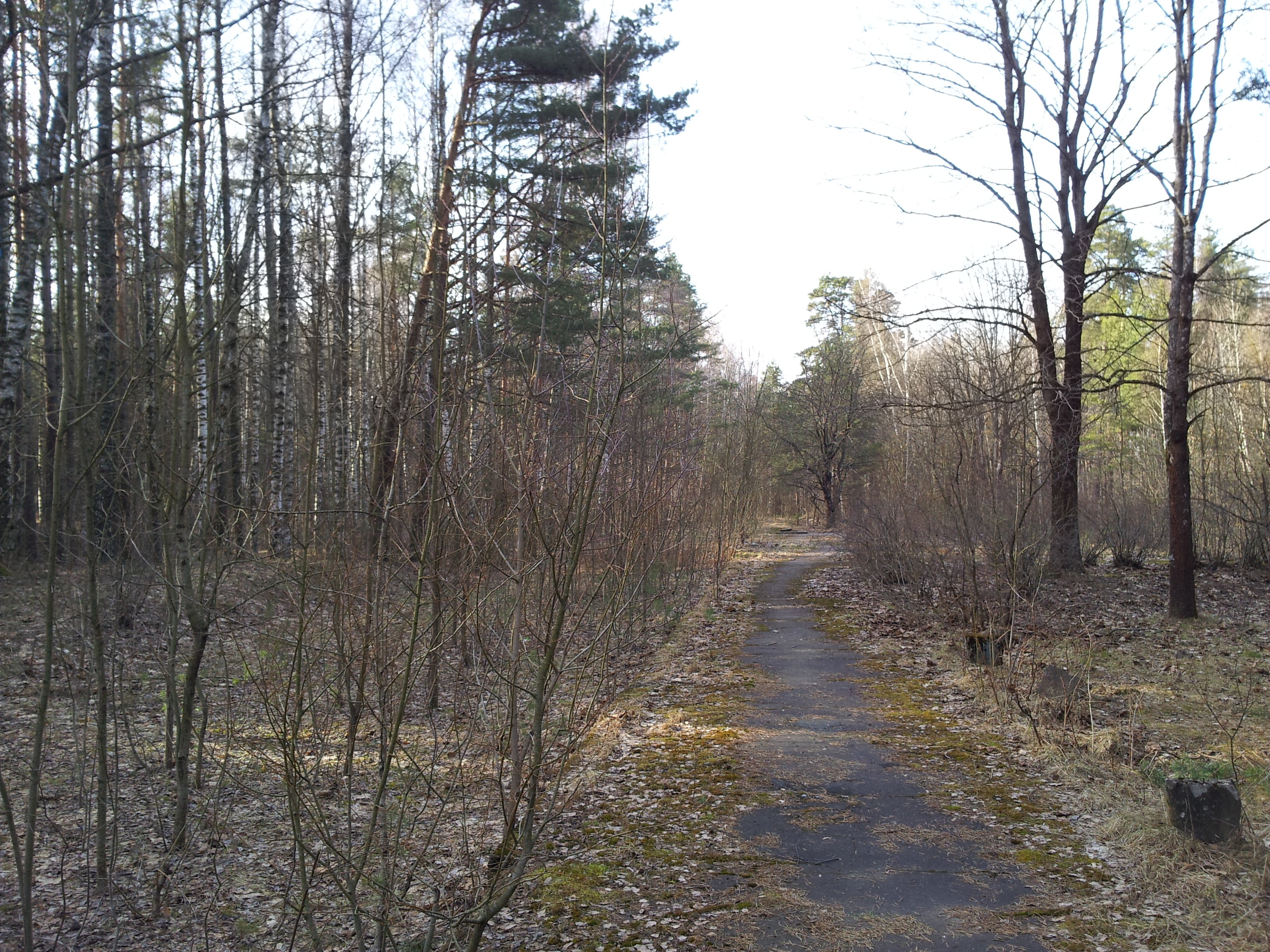 перрон